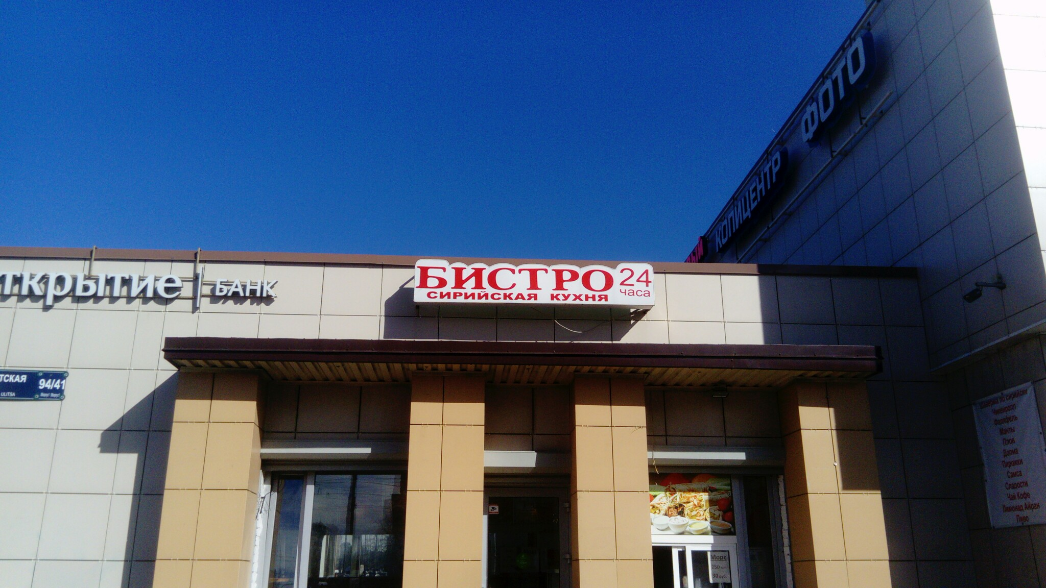 Сирийская кухня на Будапештской улице в Купчино